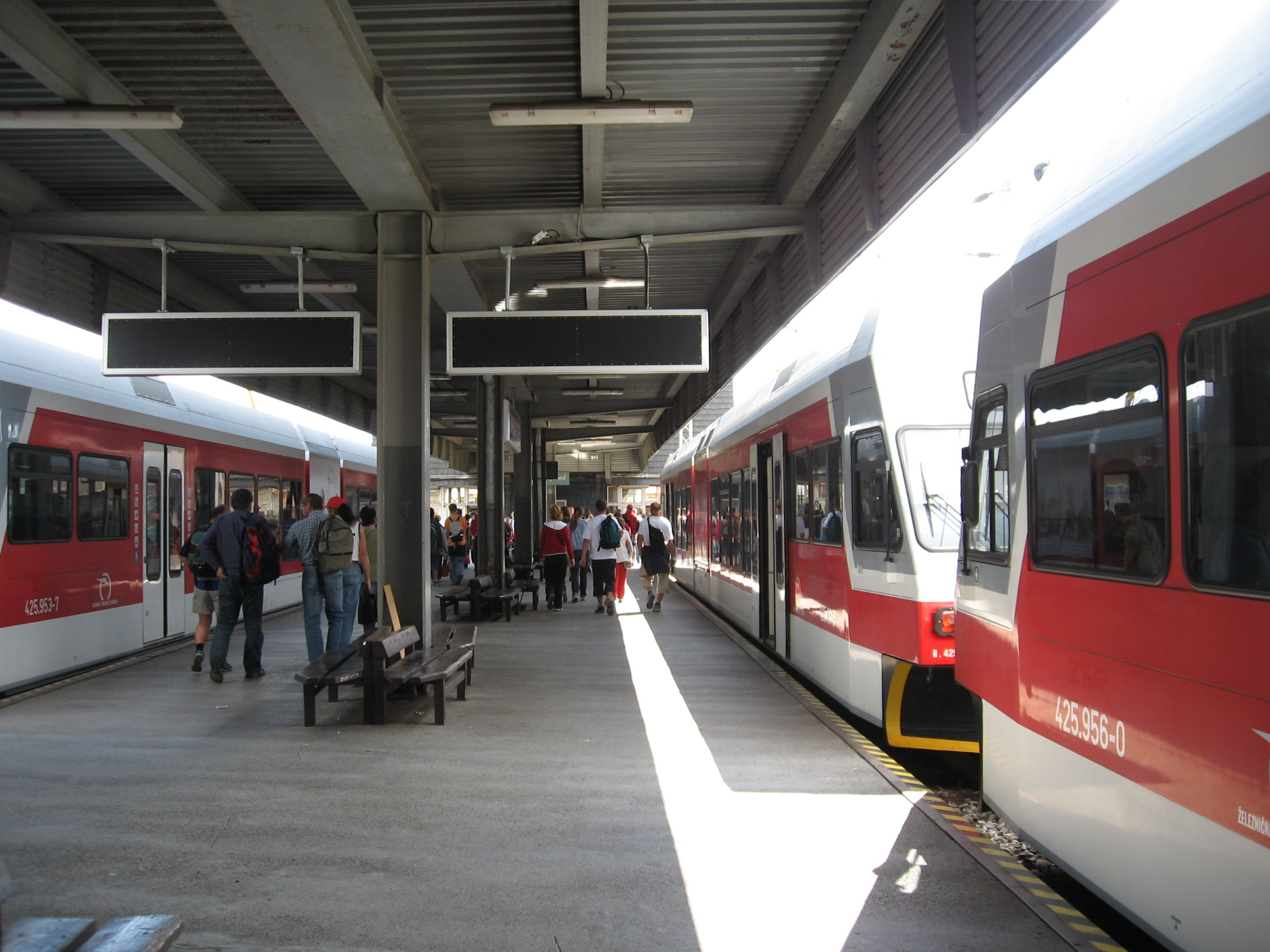 Železničná stanica Poprad-Tatry - rekonštrukcia